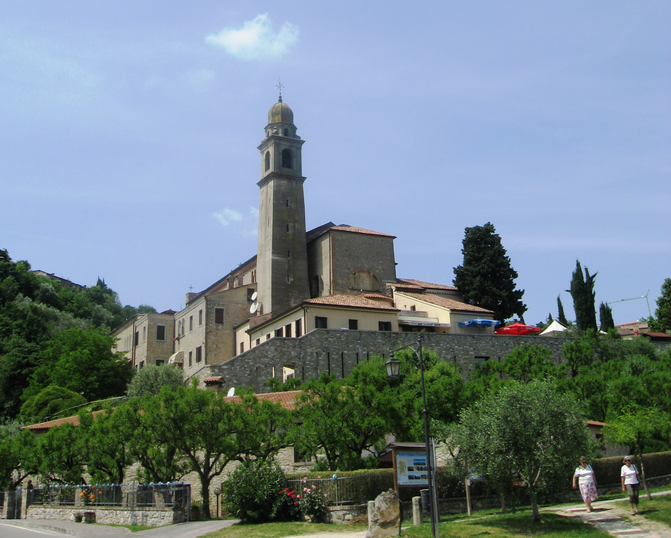 Arquá Petrarca